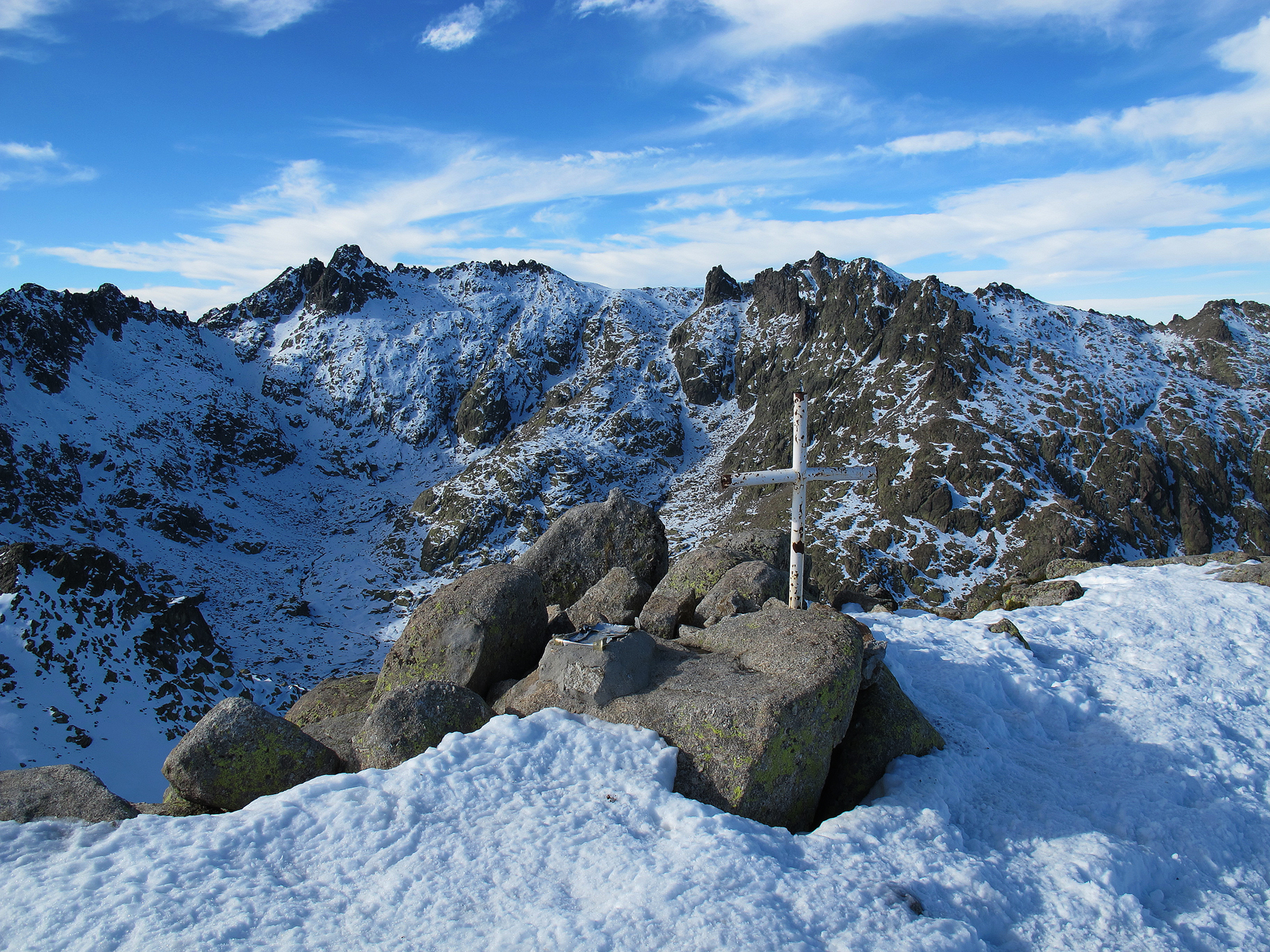 El Morezon, Gredos